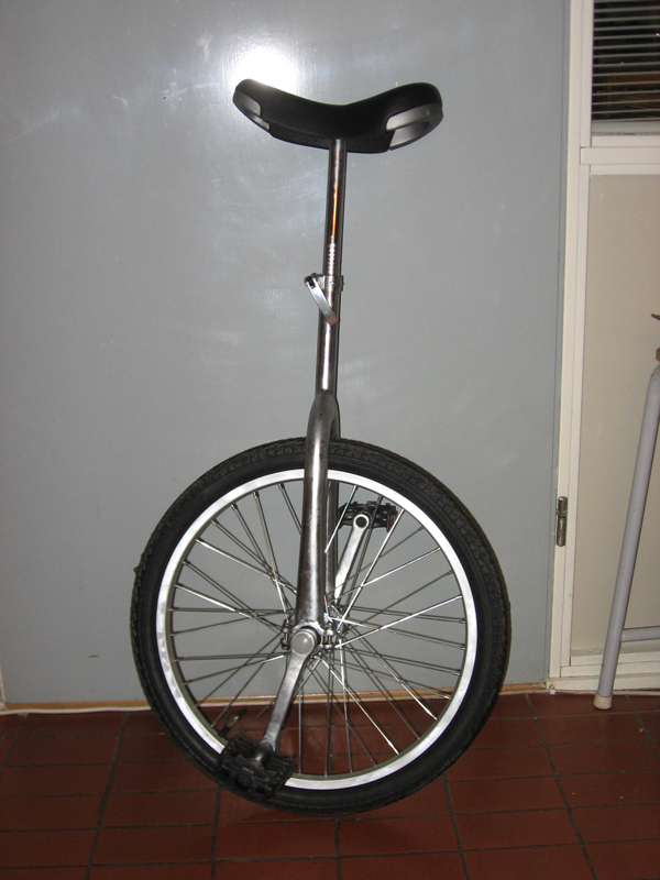 Zelfgemaakte foto van de eenwieler van mijn zusje.